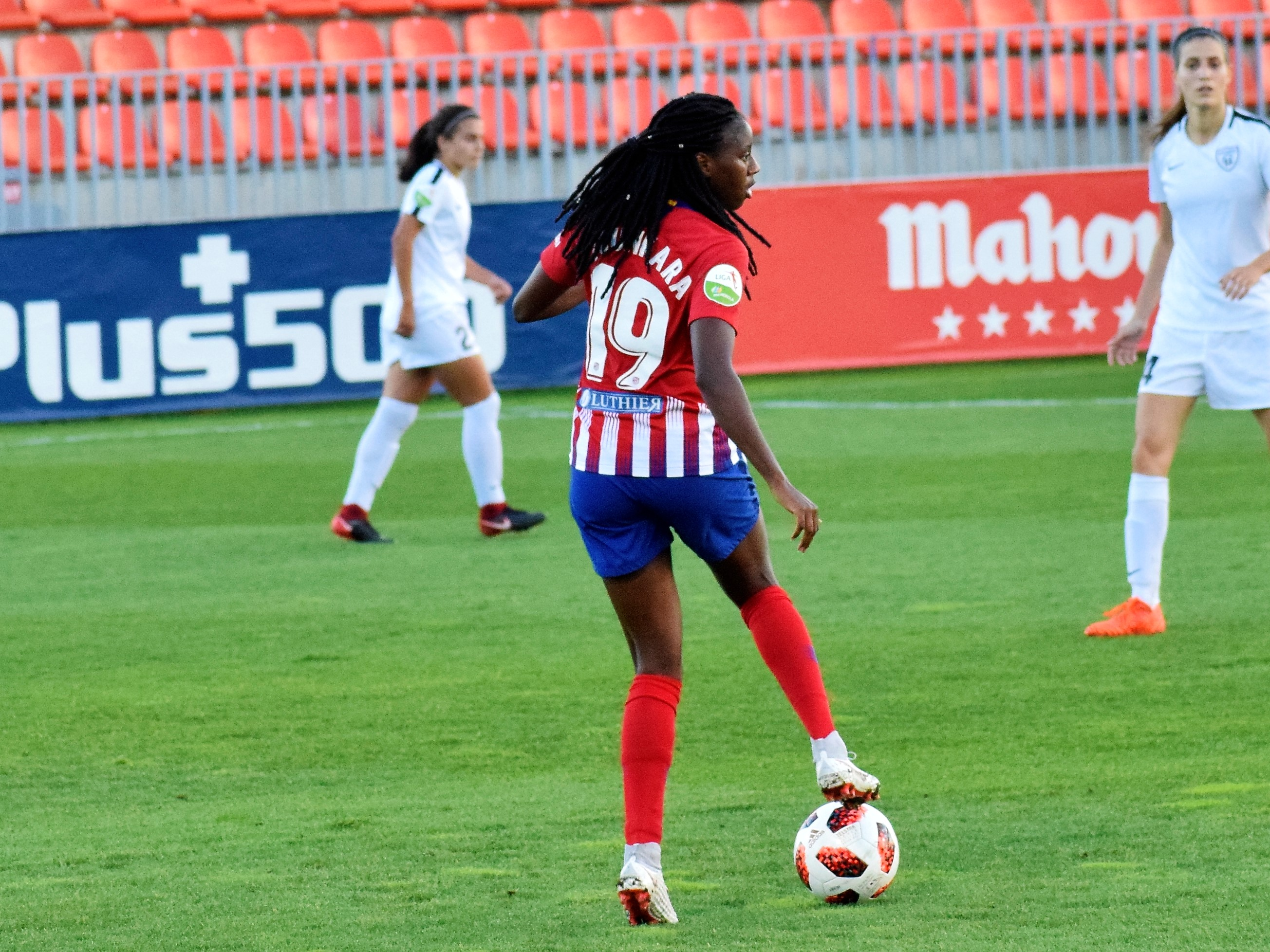 Aissa Tounkara jugando con el Atlético de Madrid